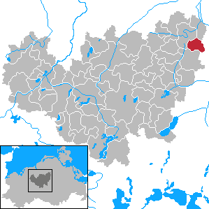 Finkenthal in Mecklenburg-Vorpommern - District Güstrow